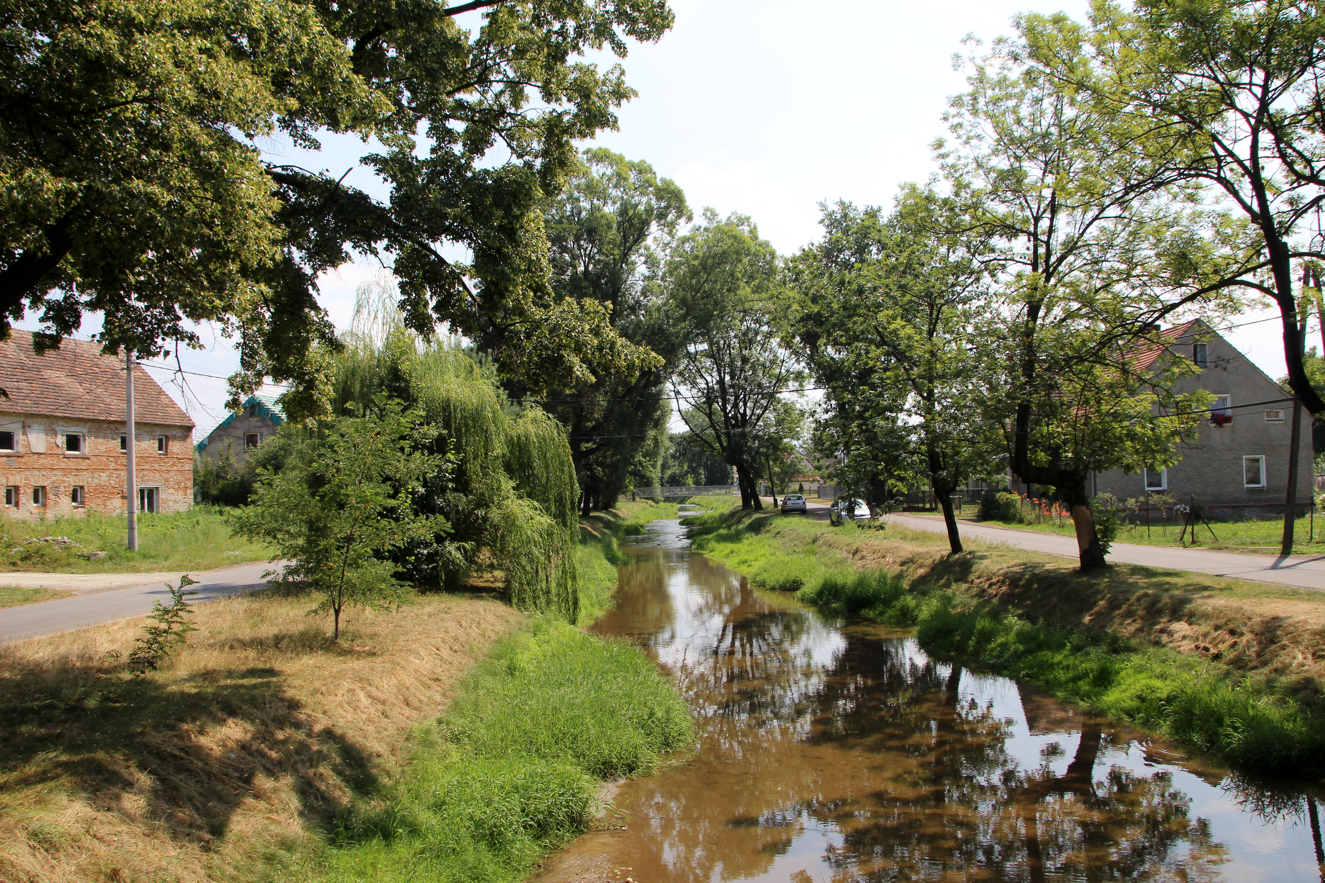 Dziewiętlice (Pruský Jindřichov, Heinersdorf) – wieś w Polsce, w województwie opolskim, w powiecie nyskim, w gminie Paczków.